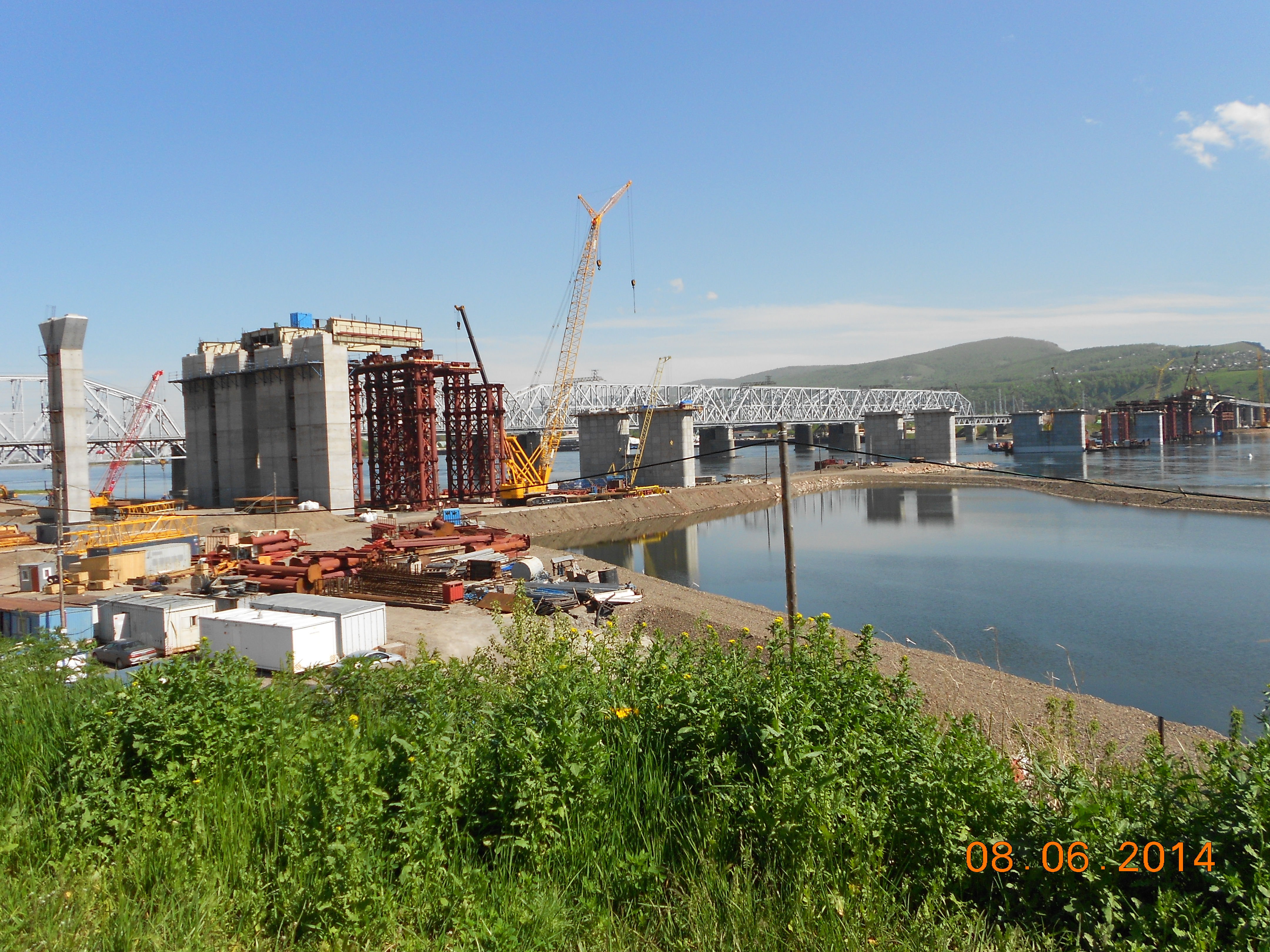 Строительство моста.